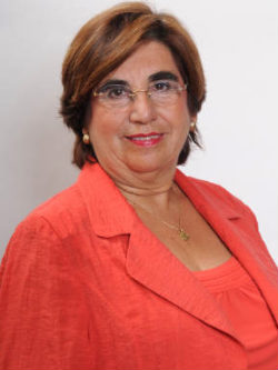 María Antonieta Saa Díaz